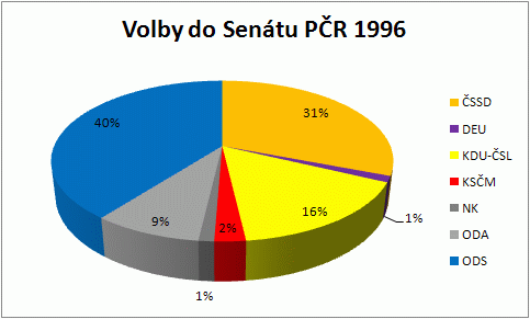 Výsledky voleb do Senátu Parlamentu České republiky 1996